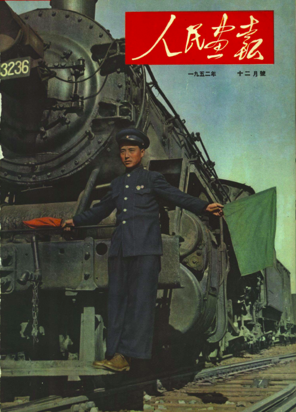 1952 李锡奎调车法